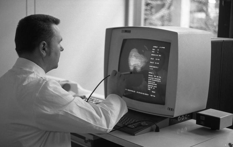 Deutsches Krebsforschungszentrum in Heidelberg (Interaktive Auswertung eines Leber-Szintigramms nach einer nuklear-medizinischen Untersuchung) 13.-17.1.1975